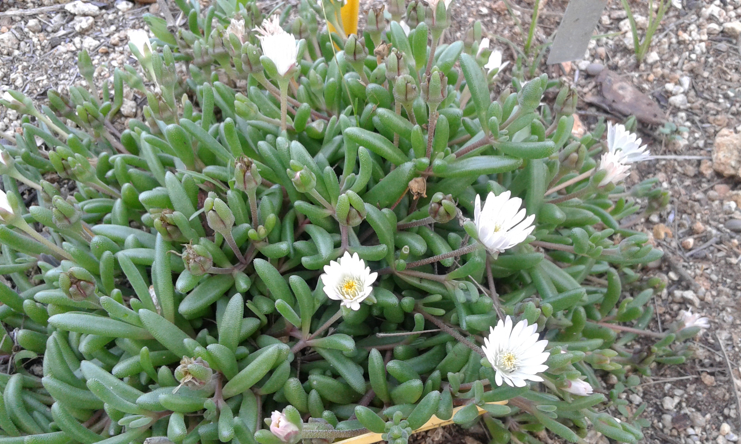 Ejemplar de la planta Delosperma karooicum en el Jardín Botánico de Barcelona.